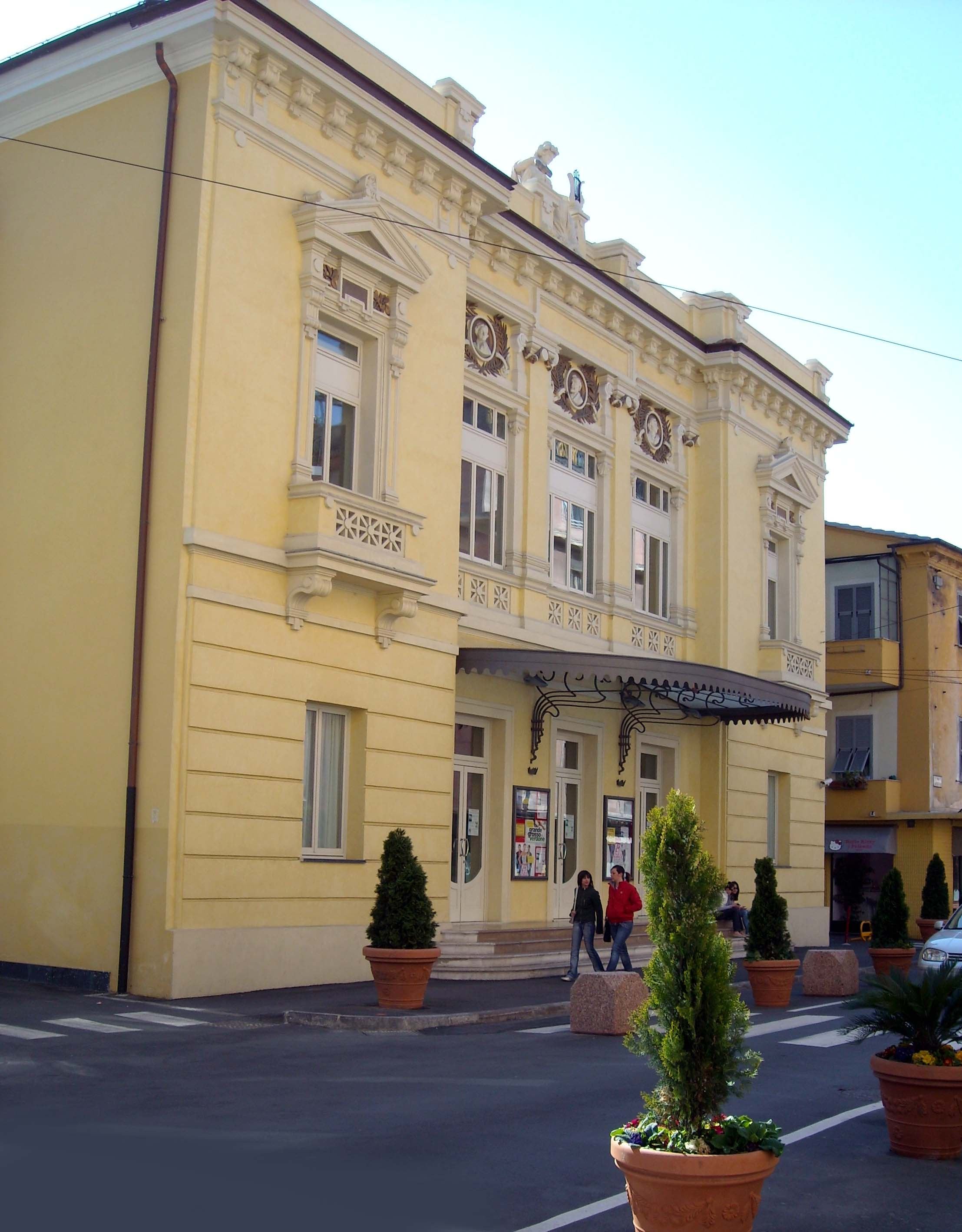 Il teatro di ventimiglia, Liguria, Italia.